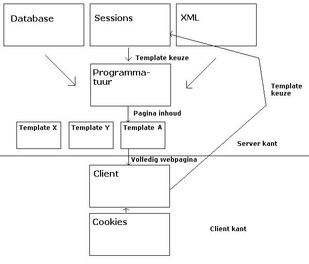 Hoe een php webpagina wordt opgebouwd met het gebruik van layout templates.